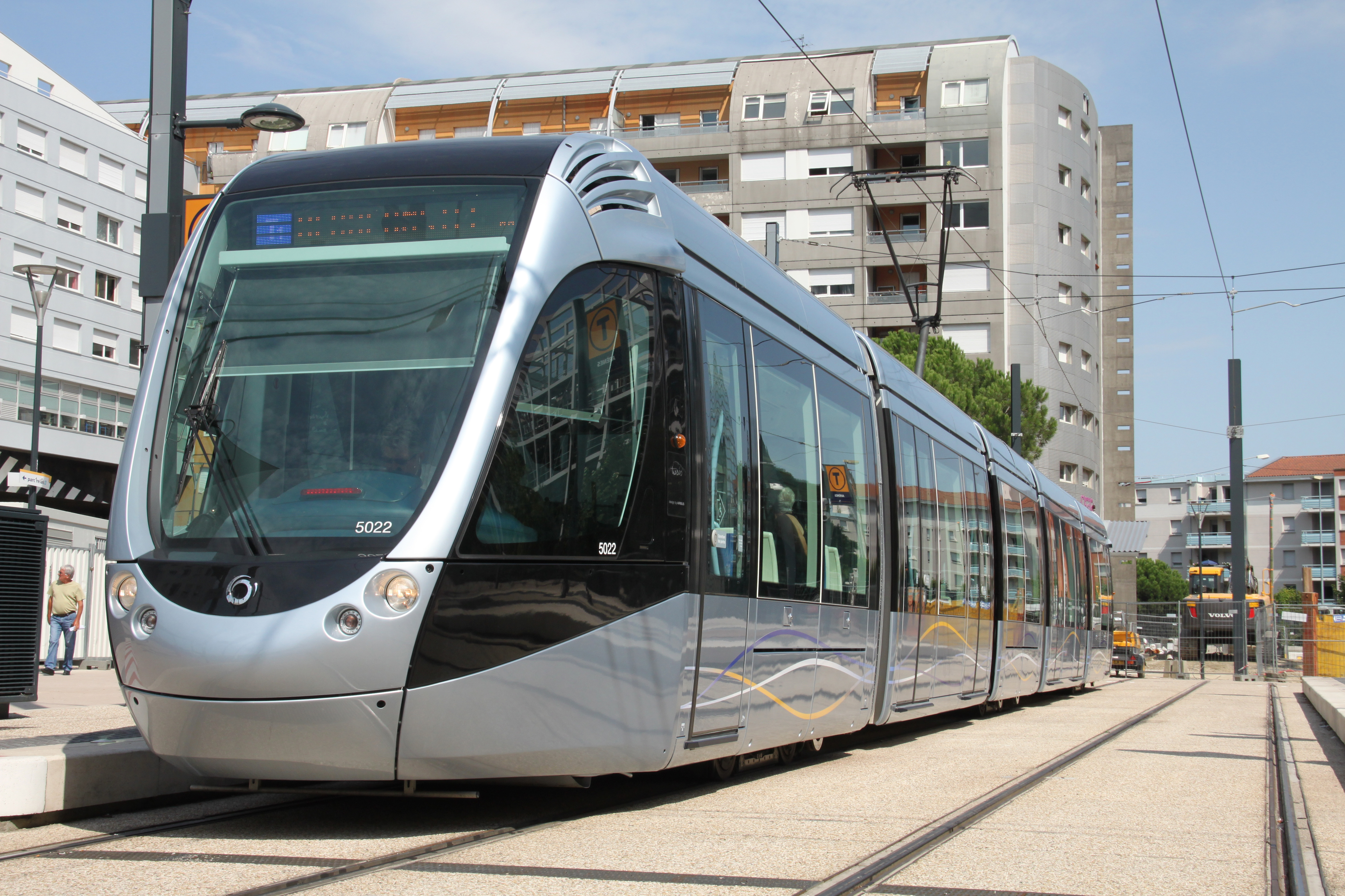 Een tramstel van de tram van Toulouse aan het beginpunt Arènes.